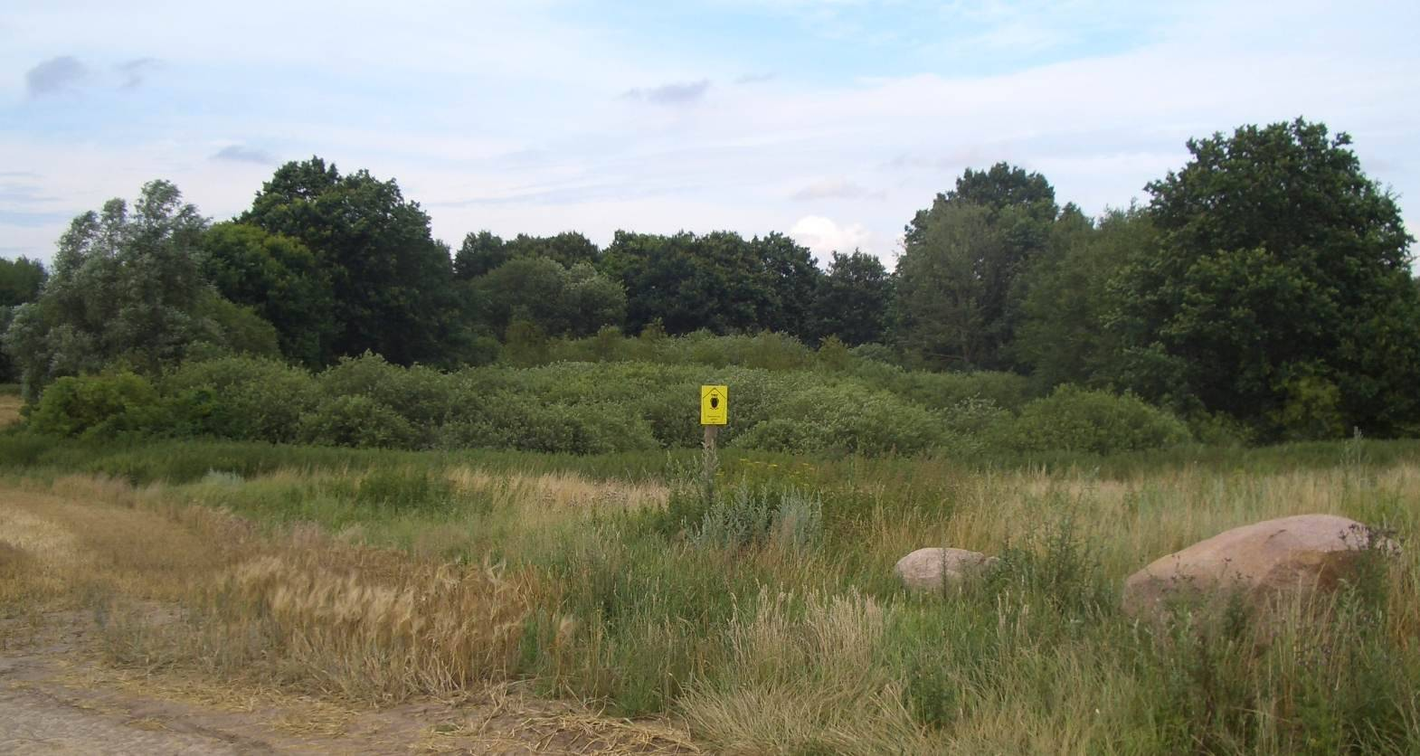 Brooksee, südlich Brookhusen (Mecklenburg-Vorpommern, Deutschland). Blick von Osten.